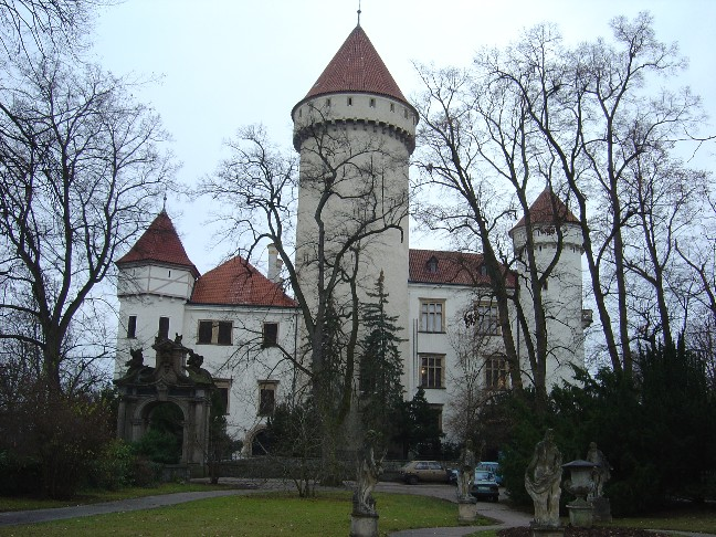 SchlossKonopiste